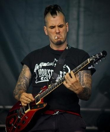 Philip H. Anselmo på Hellfest 09.